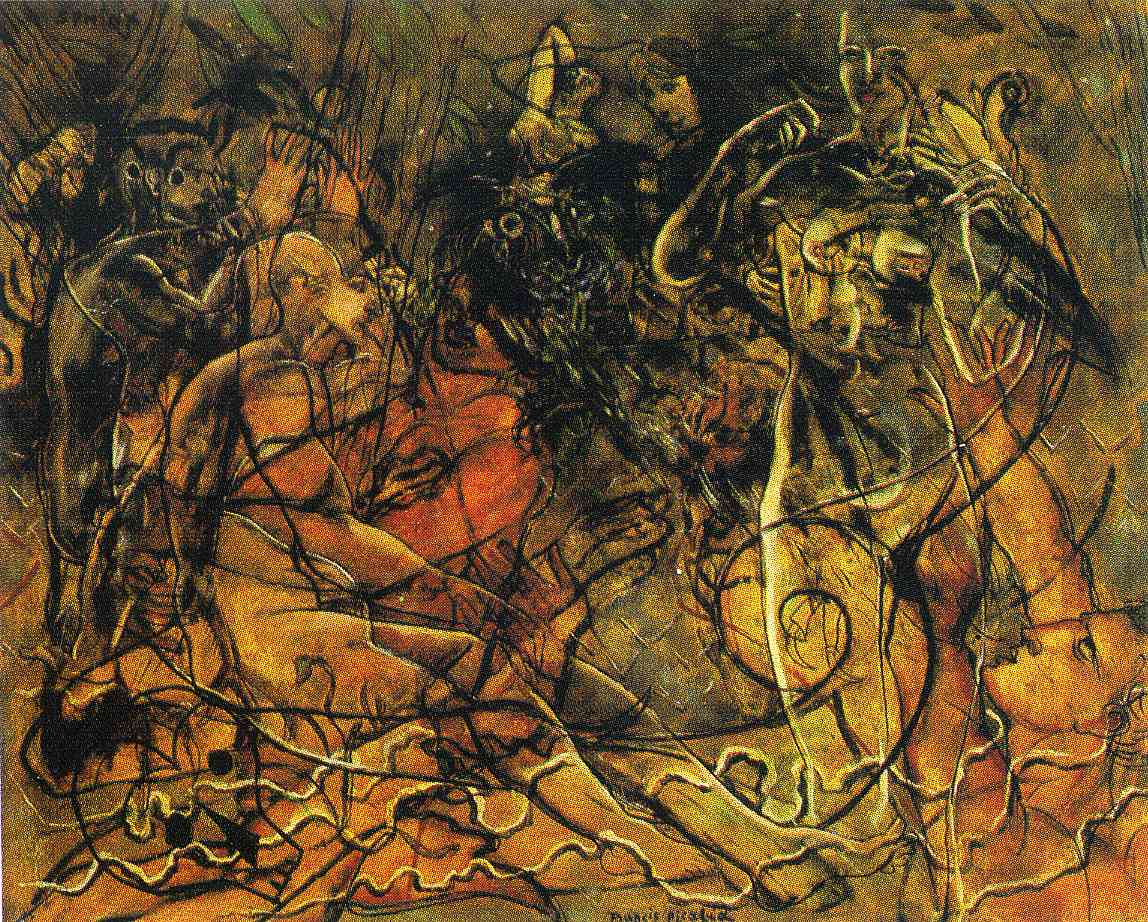 Francis Picabia - Transparence